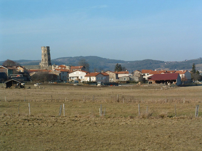 Photos de la Commune de Saint Germain Laprade